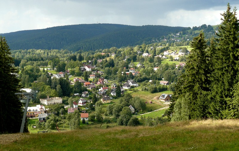 Bublava-pohled od rozhledny Bleiberg směrem na Klingenthal